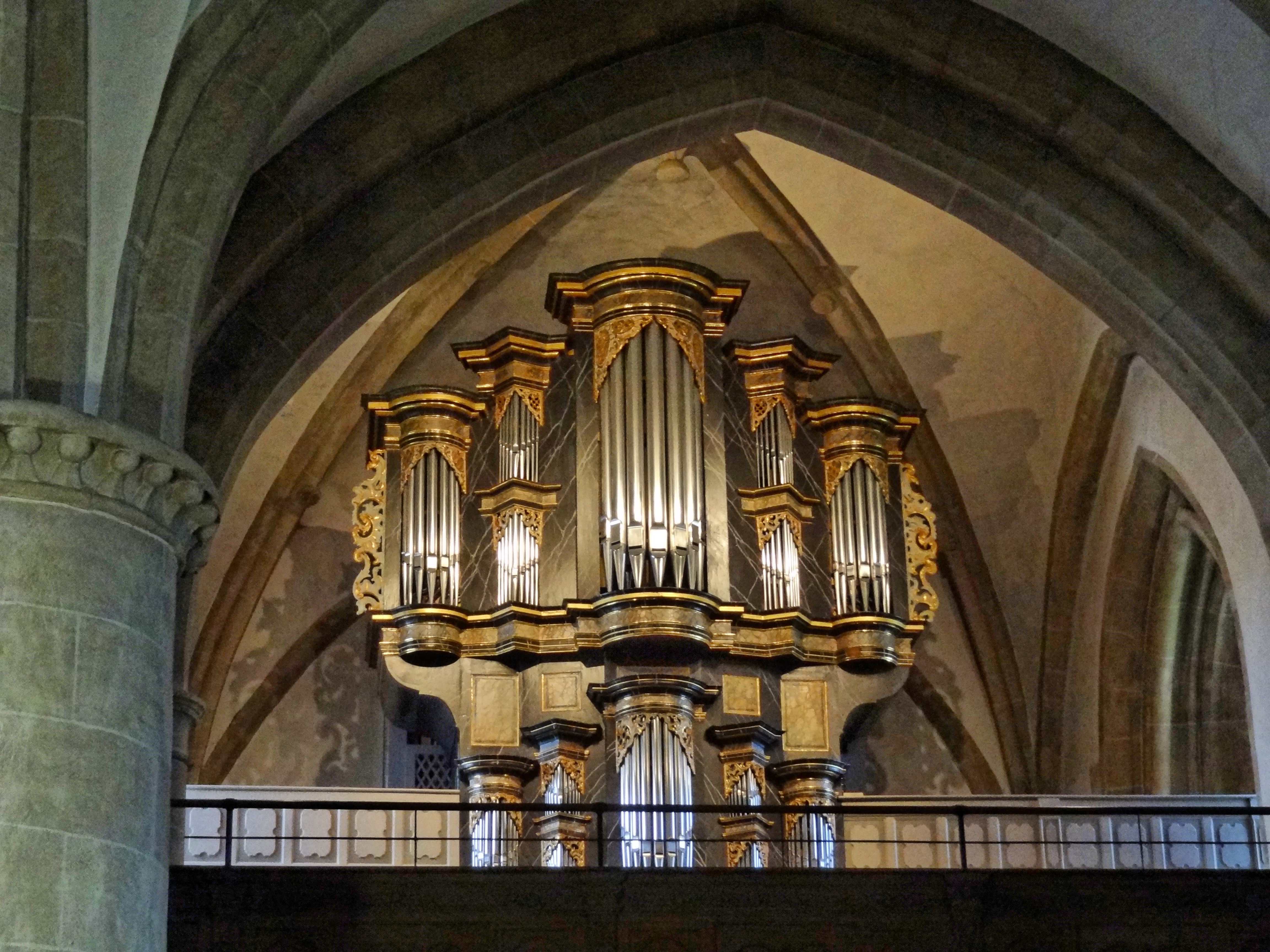 Rüthen St. Nikolaus Orgel